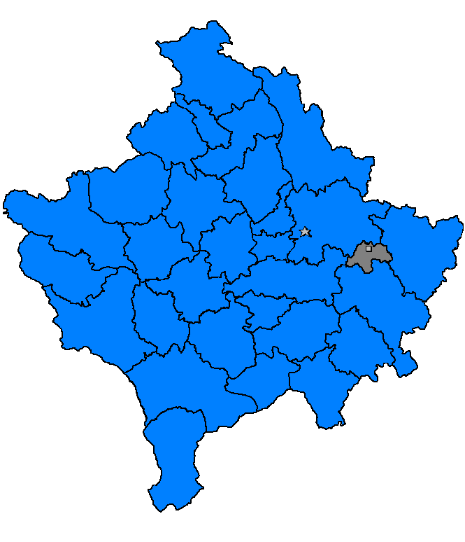 Novobërdë, Kosovë 2006